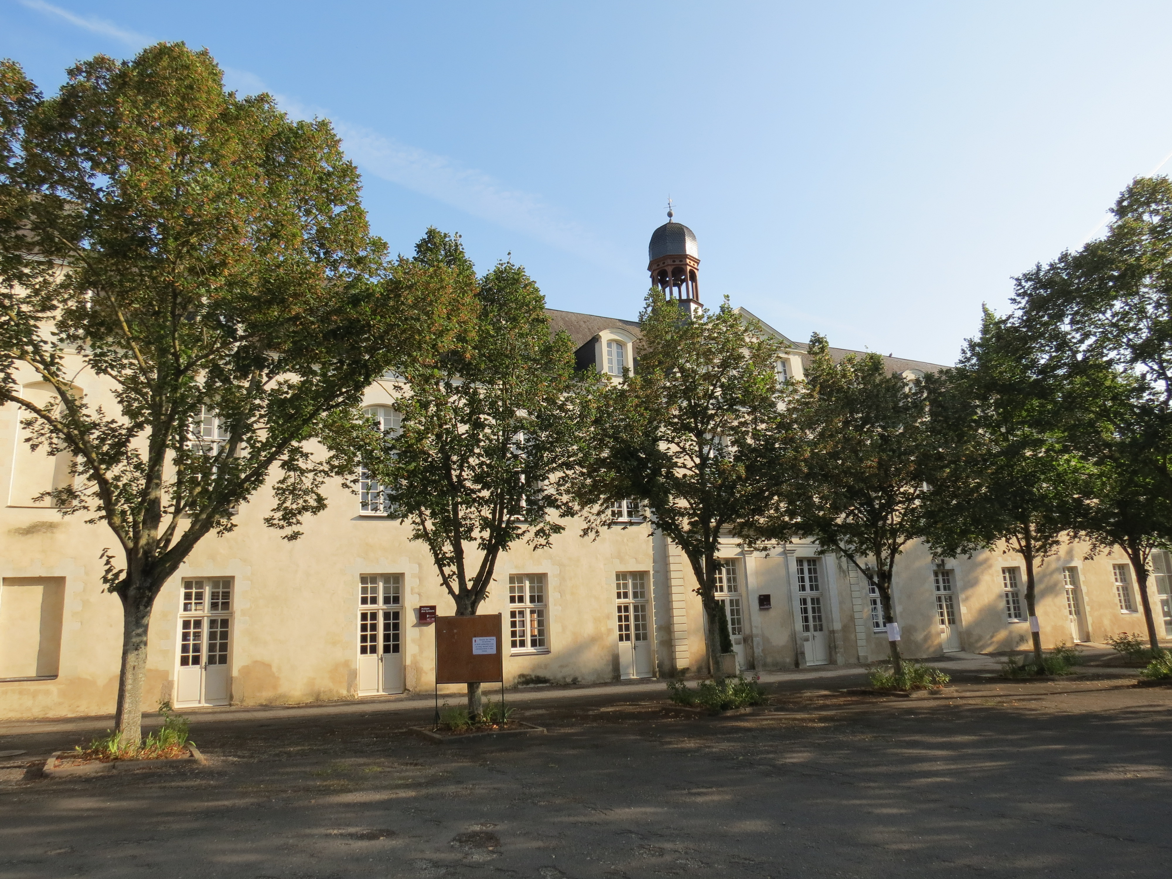 Lycée Victor-Hugo, Château-Gontier, Mayenne. Bâtiment dit "bâtiment de l'horloge"